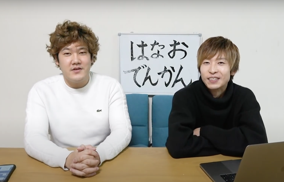 YouTuberのはなおでんがん。原典動画の0:20より。